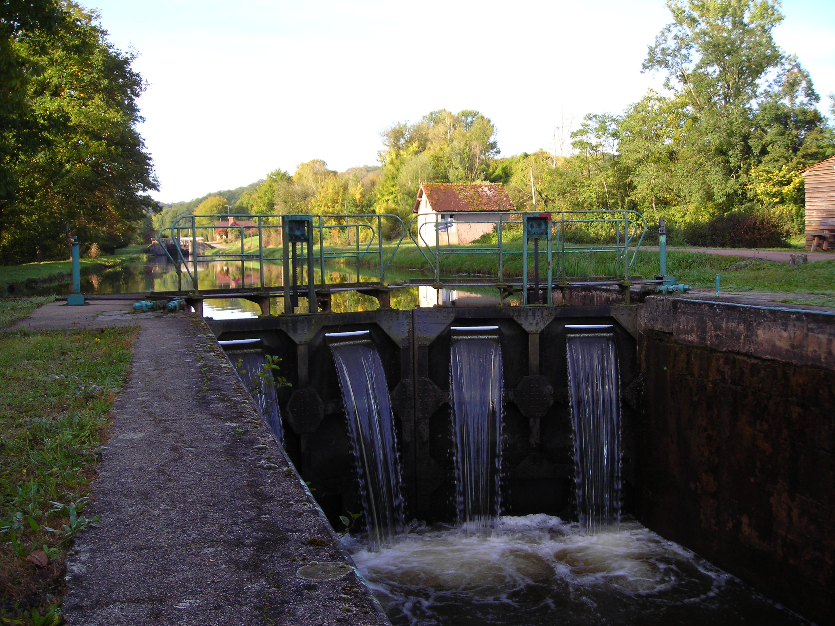 Ecluse n.16 de Sardy sur le versant Seine du canal du nivernais